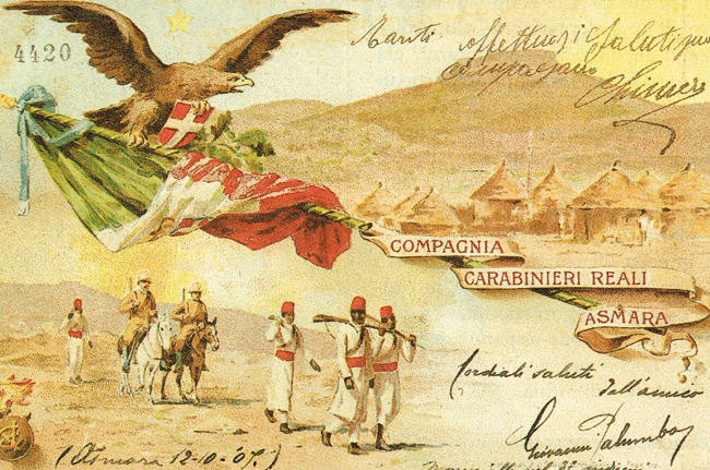 Cartolina dei Carabinieri Reali spedita dalla Colonia Eritrea dell'Asmara (1907)